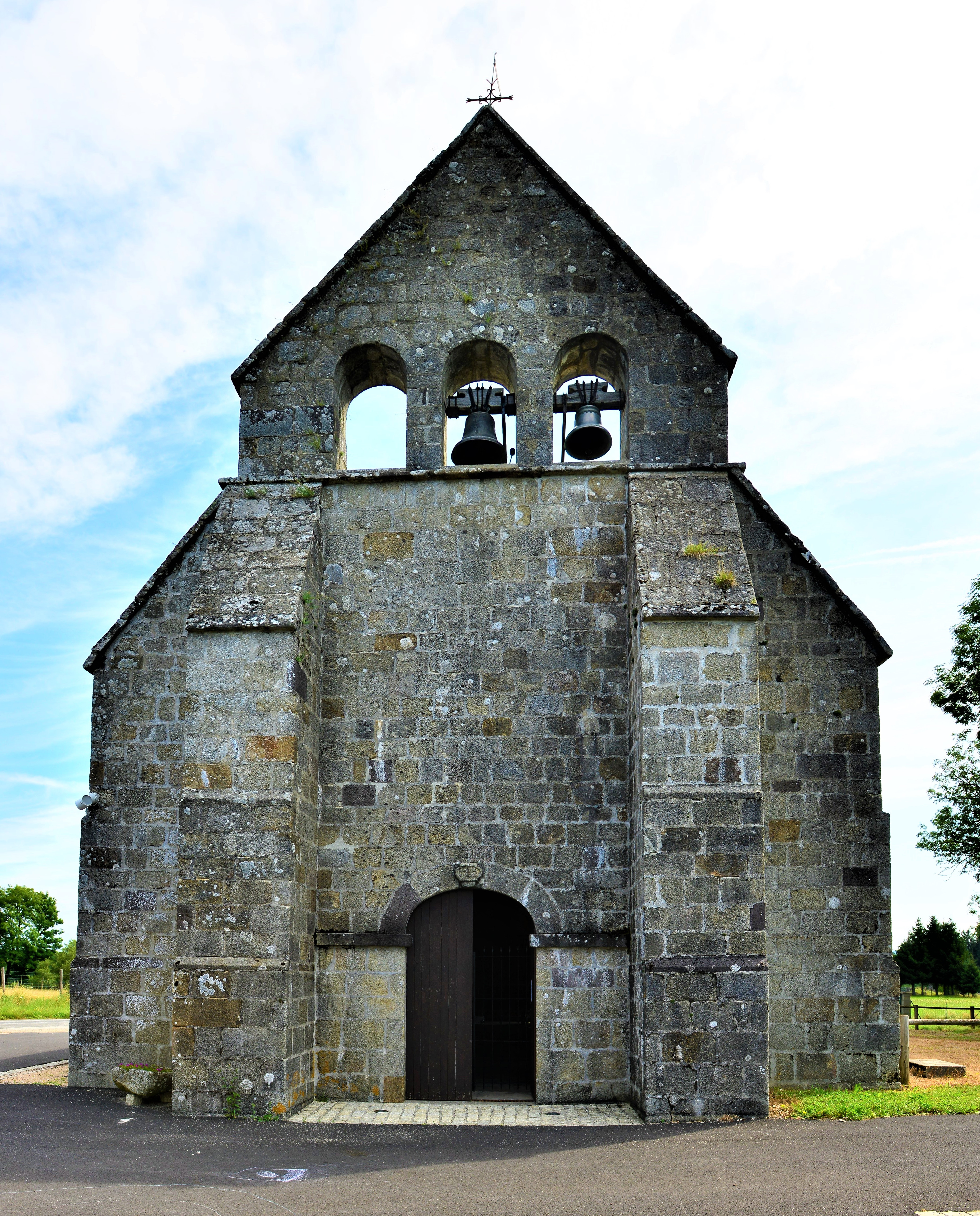 La Roche Près Feyt, Corrèze, France.